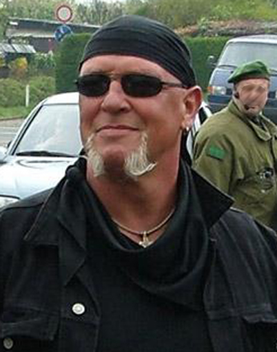 Siegfried Borchardt, genannt SS-Siggi, auf einer Demonstration am 16. April 2005 in Essen Ausschnitt aus